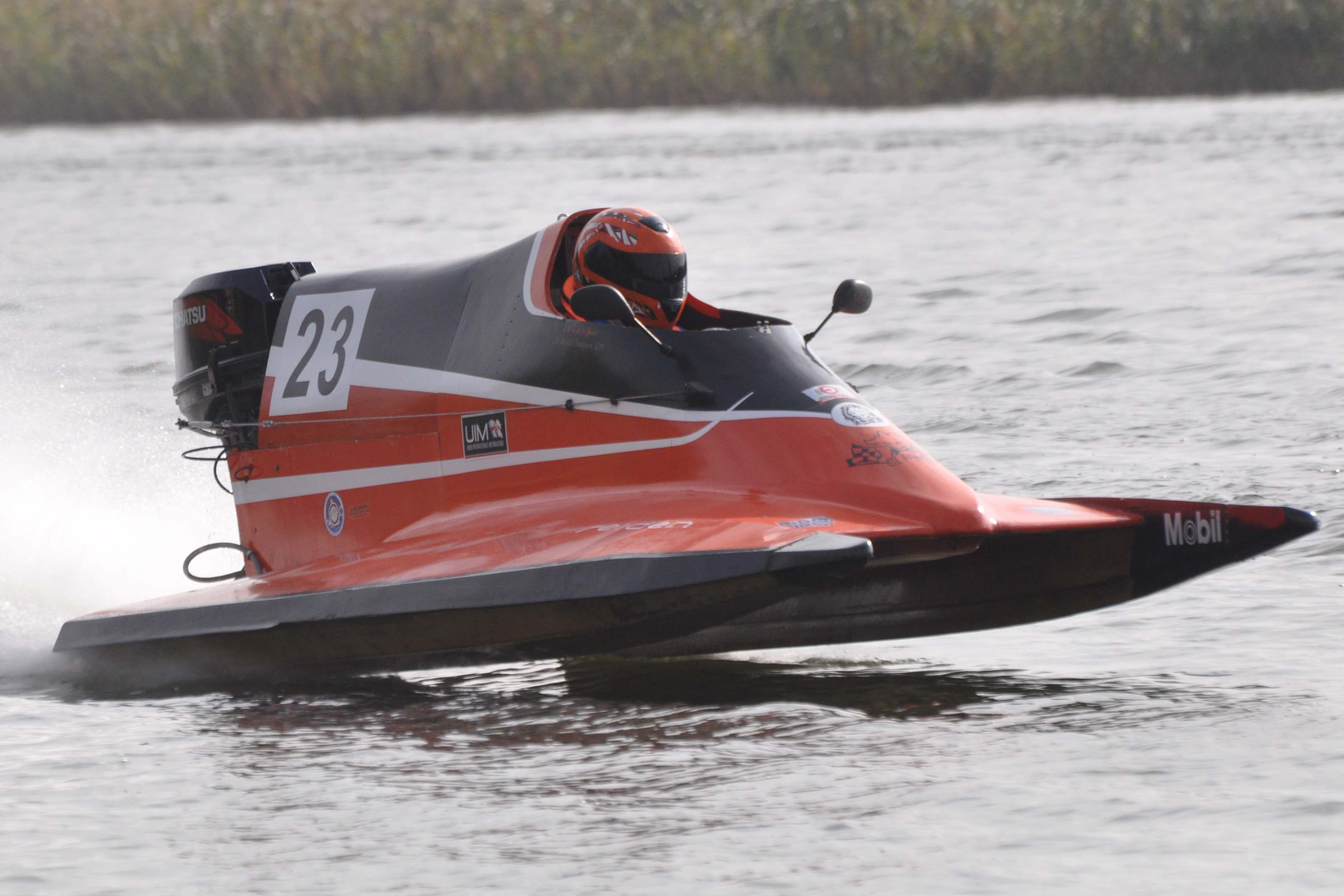 Maailmameister ja Euroopa meister S-550